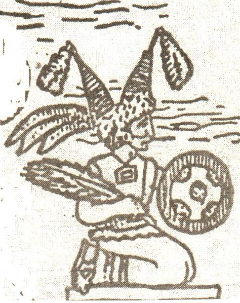 Imagen de la Diosa Mesoamericana Toci, abuela de los Dioses, corazón de la tierra, diosa de los textiles y la salud. Una de las diosas madres, a veces igualada con Tlazolteotl